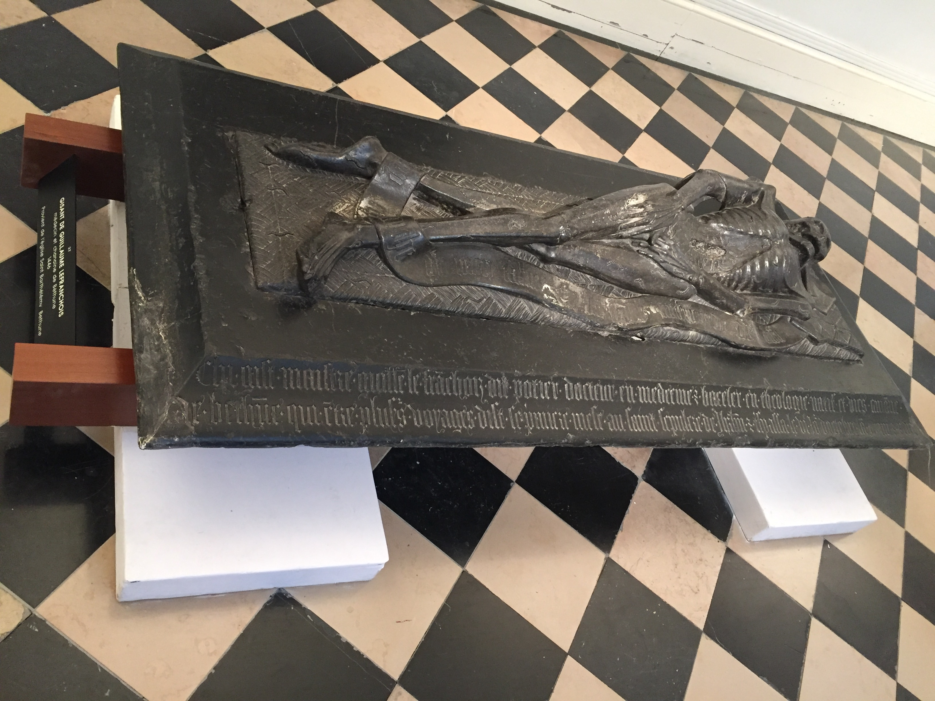 Transi de Guillaume Lefranchois, XVe siècle. Musée des Beaux Arts d’Arras